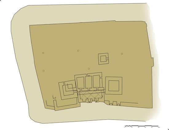 מצודת הונין - חפיר רחב ועמוק ברוחב ממוצע שבין 12 ל-14 מטר המקיף את המצודה משלושה עברים ומשויך לשלב ב' לתקופה הצלבנית-איובית שלב ב' בשלב זה נבנה חפיר רחב ועמוק סביב המצודה. לא קיימים שרידים נוספים משלב זה.